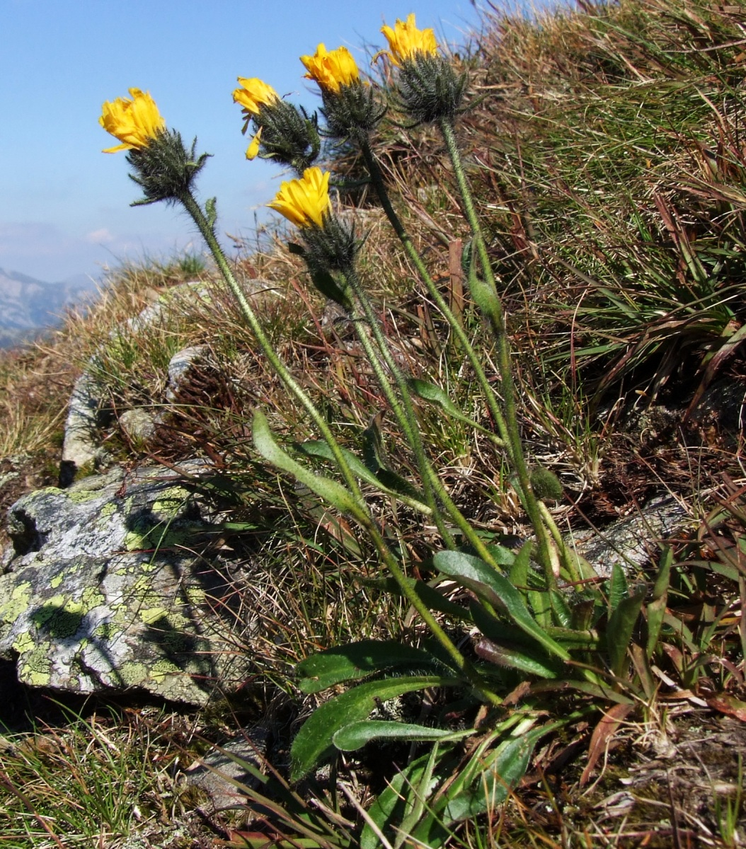 Hieracium alpinum (pl. jastrzębiec alpejski), habitat: West Tatra Mountains, Wołowiec